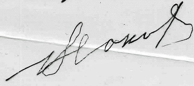 Подпись В.А Соковнина при окончании следствия